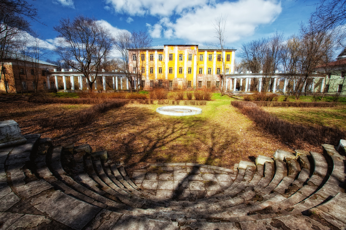 Усадьба Пехра-Яковлевское. Дворец и лестница в парке